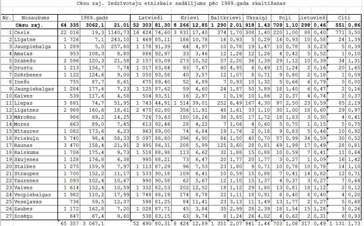 Этнический состав населения Латвии по переписи 1989 года